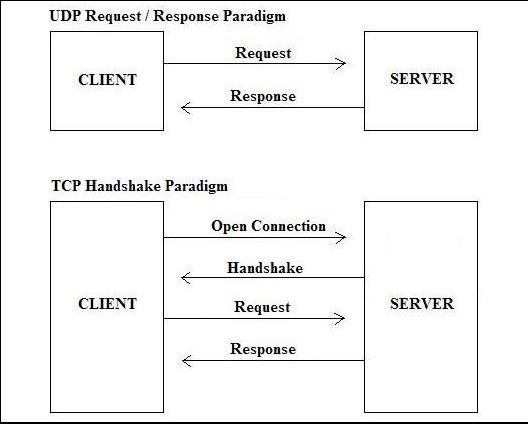 Монгол: RDP Zurag